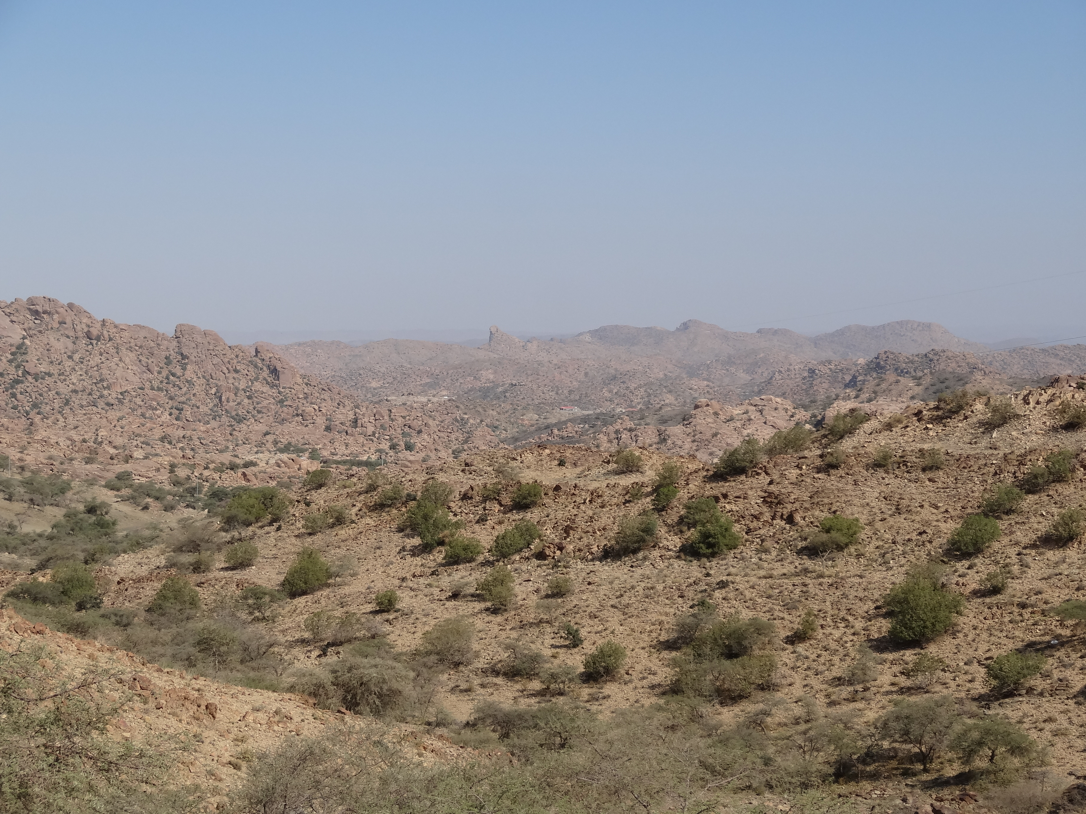 Saudi Mountain View 2